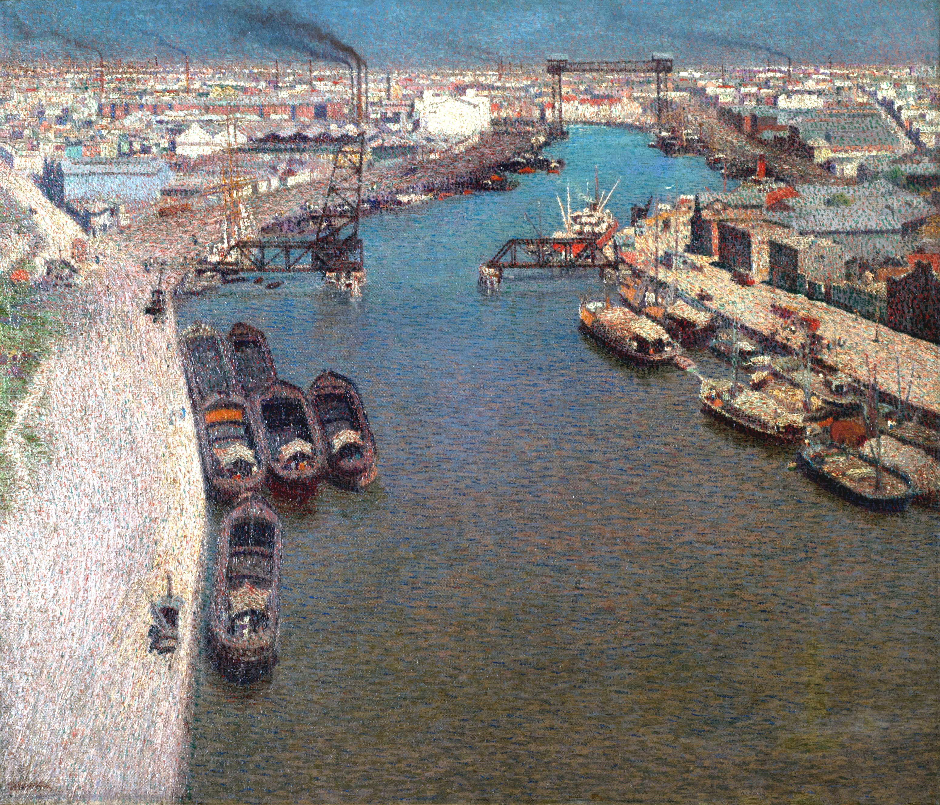 El Riachuelo.